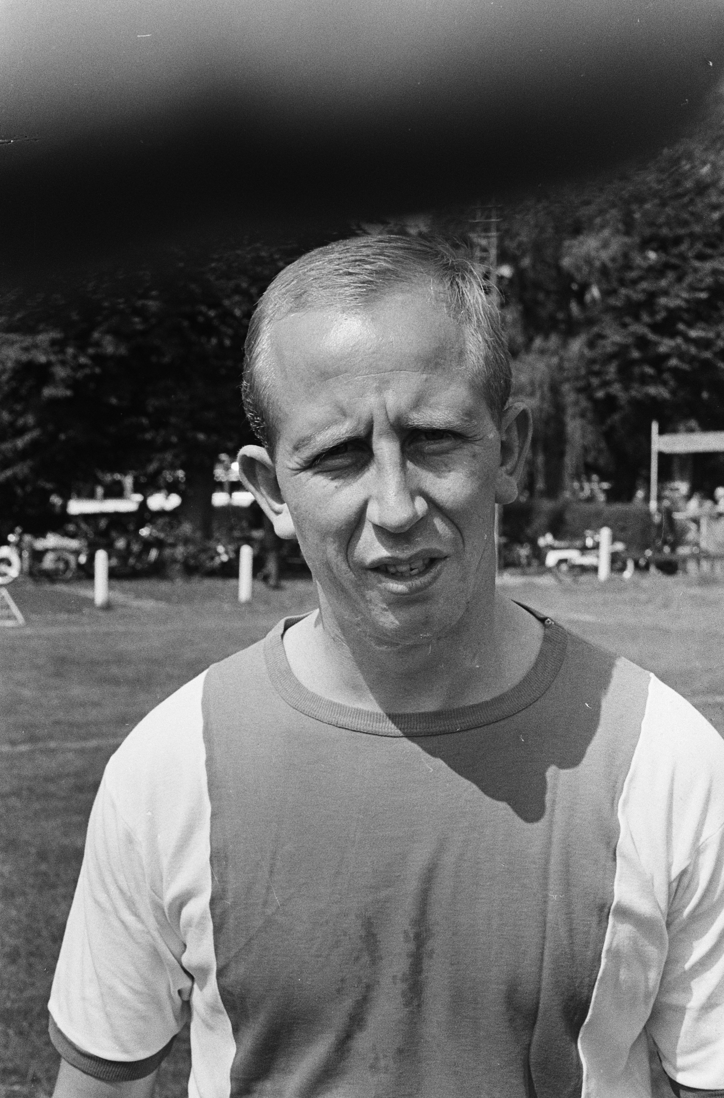 Collectie / Archief : Fotocollectie Anefo Reportage / Serie : [ onbekend ] Beschrijving : Ajax tegen Stoke City 5-3, nr. 8 Henk Groot (kop), nr. 10, 11 burgemeester Van Hall nam tribune bij Ajax officieel in gebruik Datum : 8 augustus 1965 Trefwoorden : koppen, sport, voetbal Persoonsnaam : Groot, Henk Fotograaf : Steinmeier, Hans / Anefo Auteursrechthebbende : Nationaal Archief Materiaalsoort : Negatief (zwart/wit) Nummer archiefinventaris : bekijk toegang 2.24.01.05 Bestanddeelnummer : 918-0490